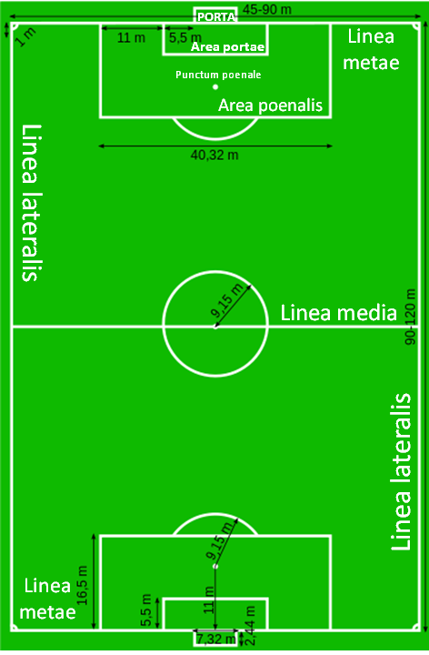 Campus pedilusorius